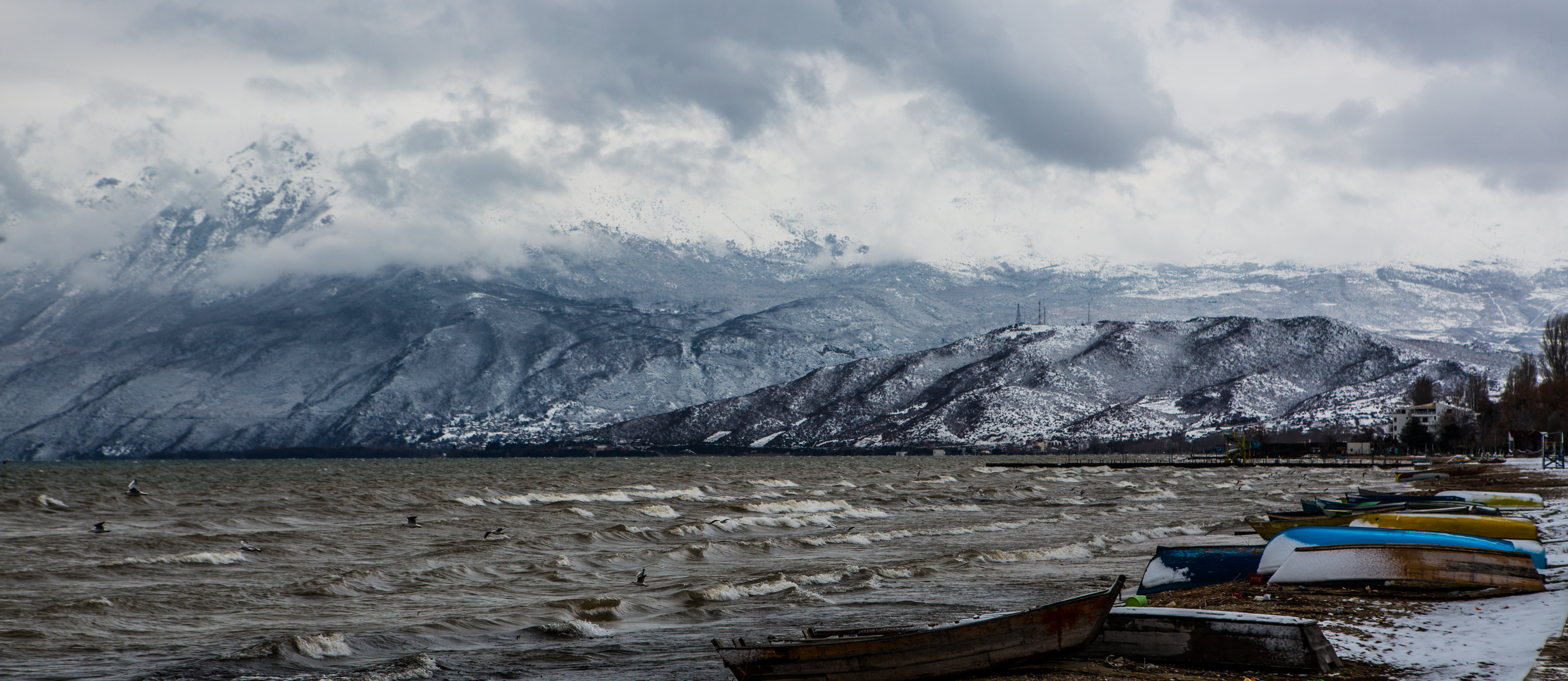 Pogradec, Pogradec